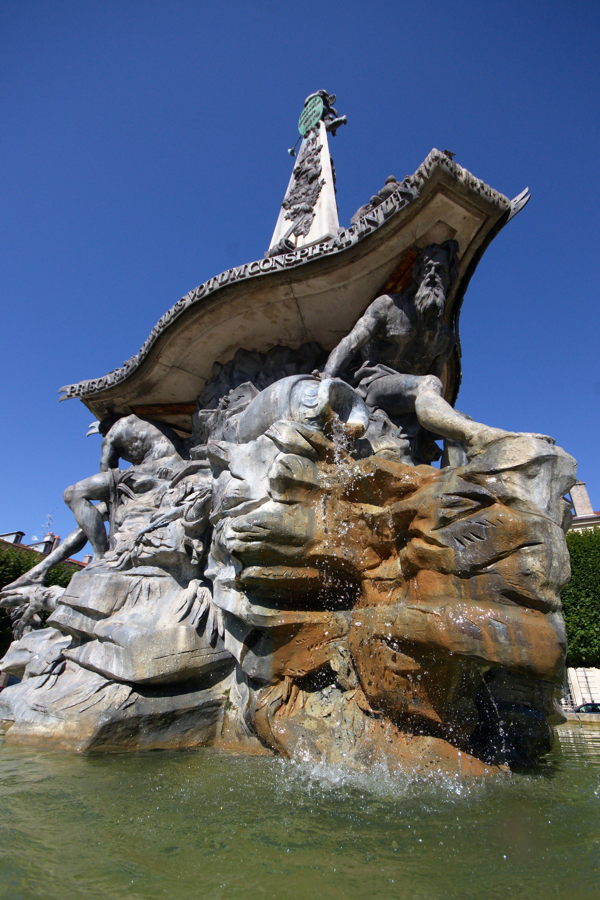 Statue de la place d'Alliance à Nancy, oeuvre de Paul-Louis Cyfflé au XVIIIe siècle